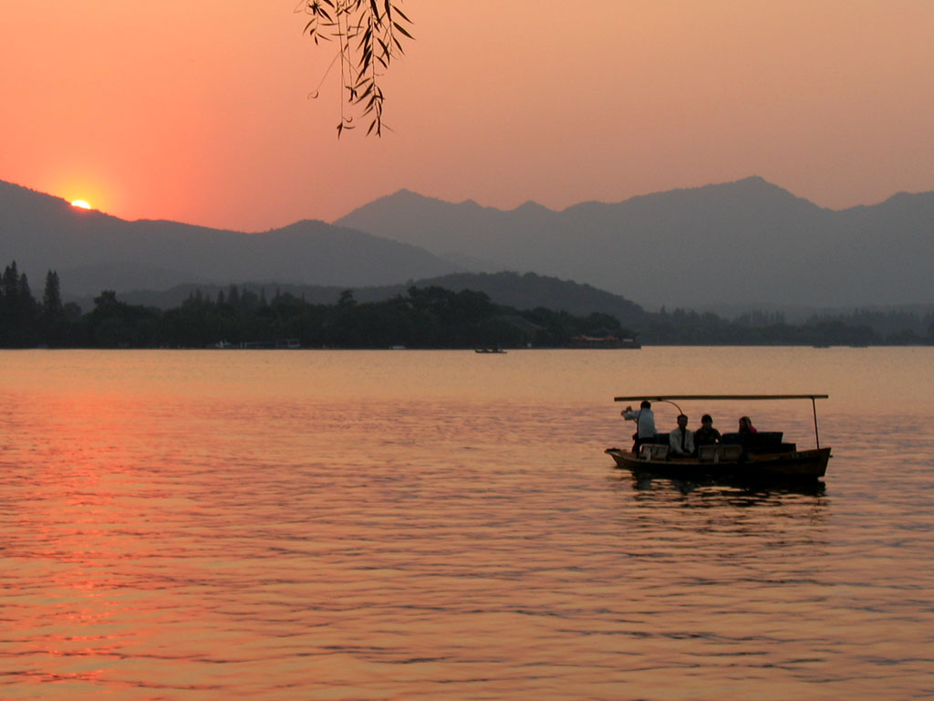 China Hangzhou Westlake